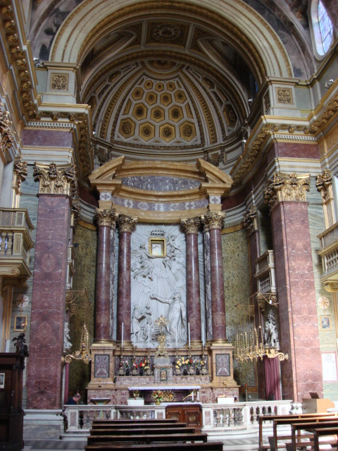 Chiesa di San Pantaleo, a Roma, nel rione Parione. Interno: altare maggiore.